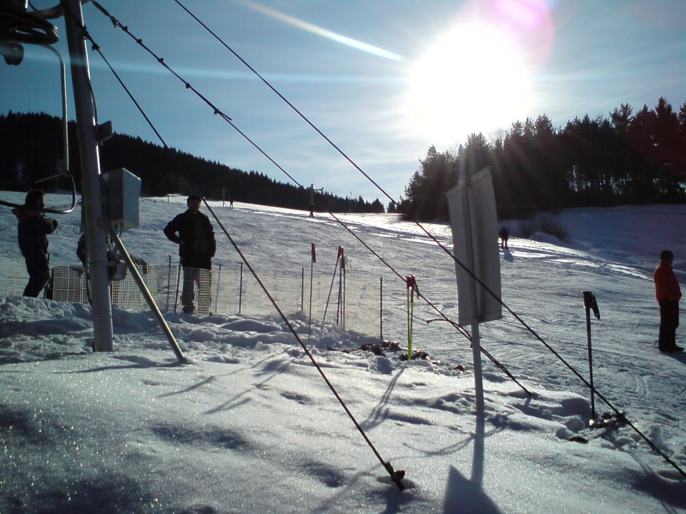 Lyžiarsky vlek SKI Strelníky